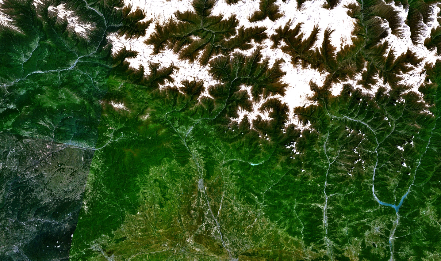 Территория Южной Осетии из космоса.